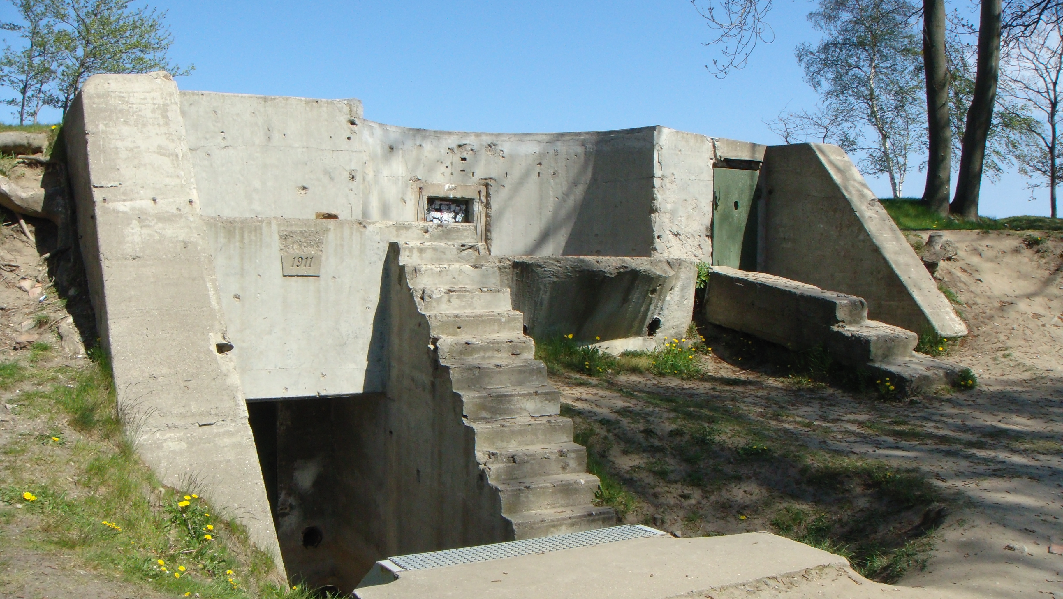 Westerplatte, Gdańsk, Poland